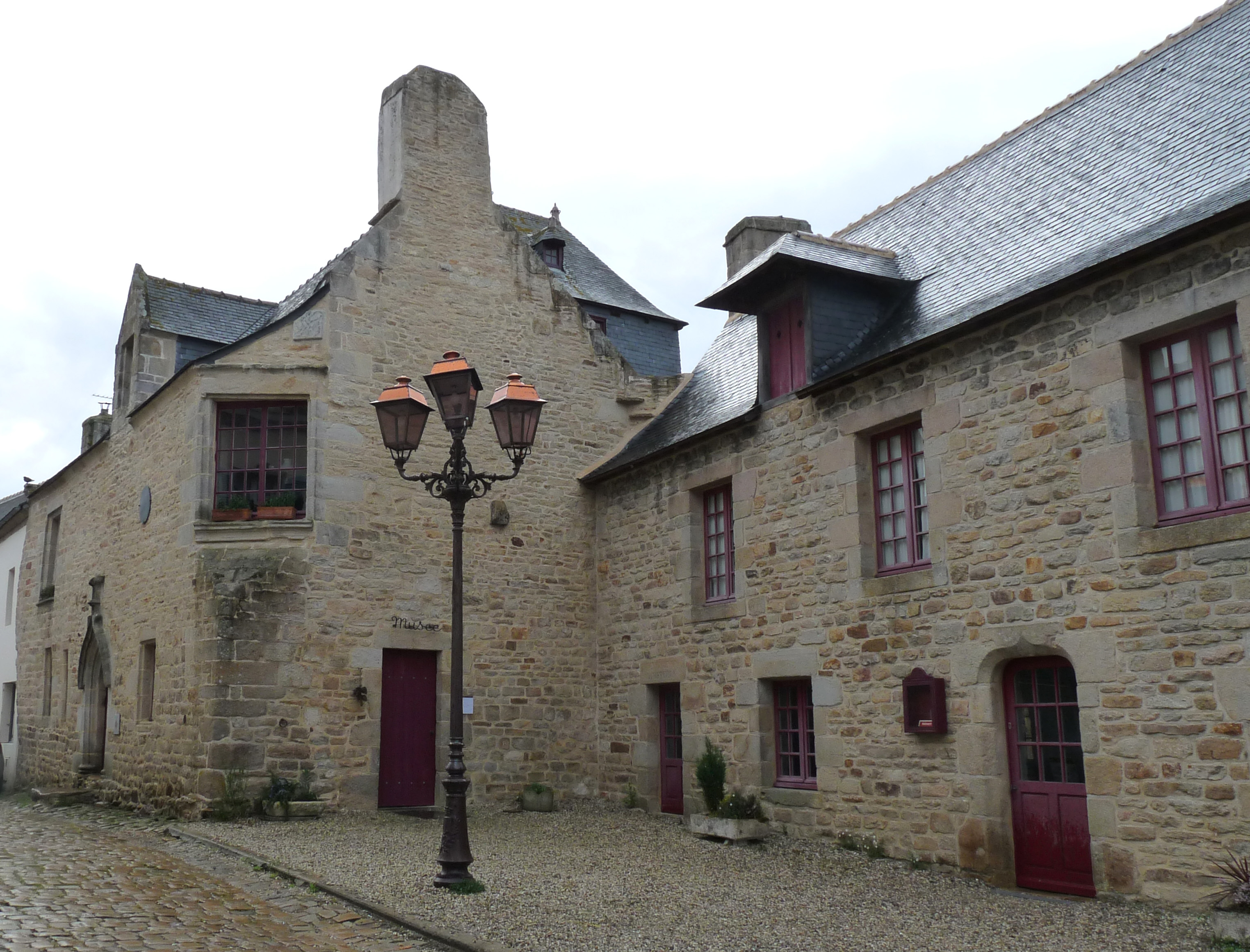 Maison du Marquisat, aujourd'hui musée du Patrimoine, à Pont-Croix (Finistère).